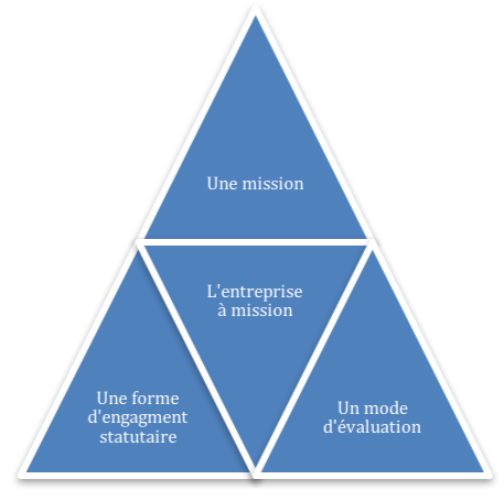 schéma décrivant le socle constitutif d'une entreprise à mission